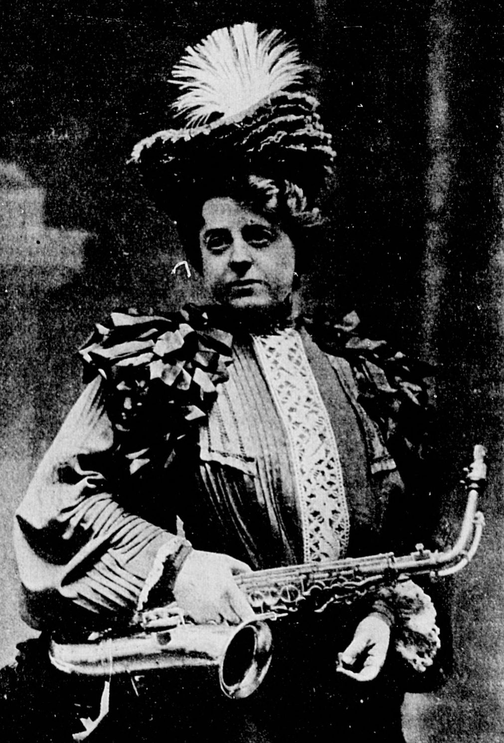 Elise Hall, cliché d'Eugène Pirou, tiré de "Paris musical et dramatique", n° 6, mai 1905